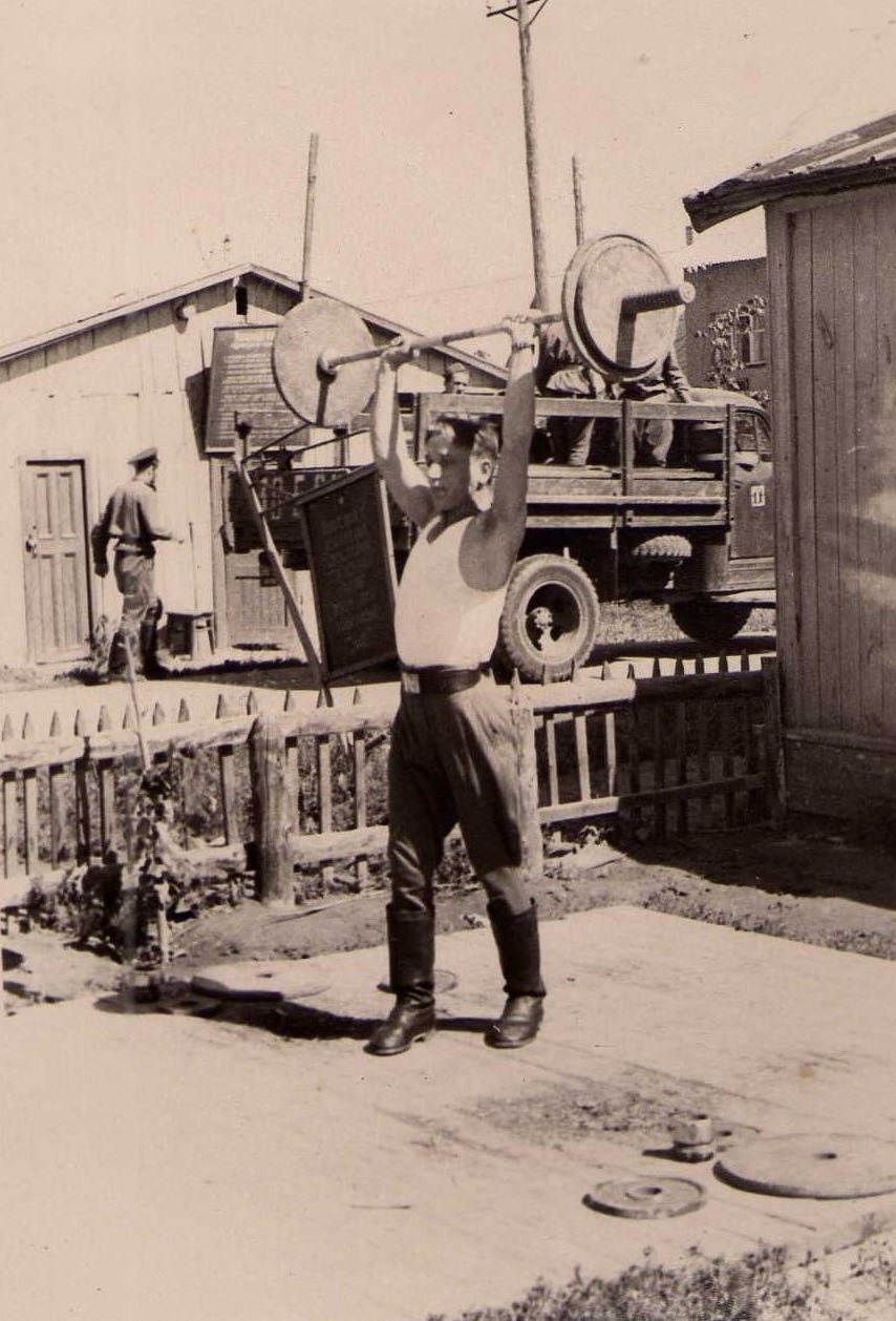 Армейский жим